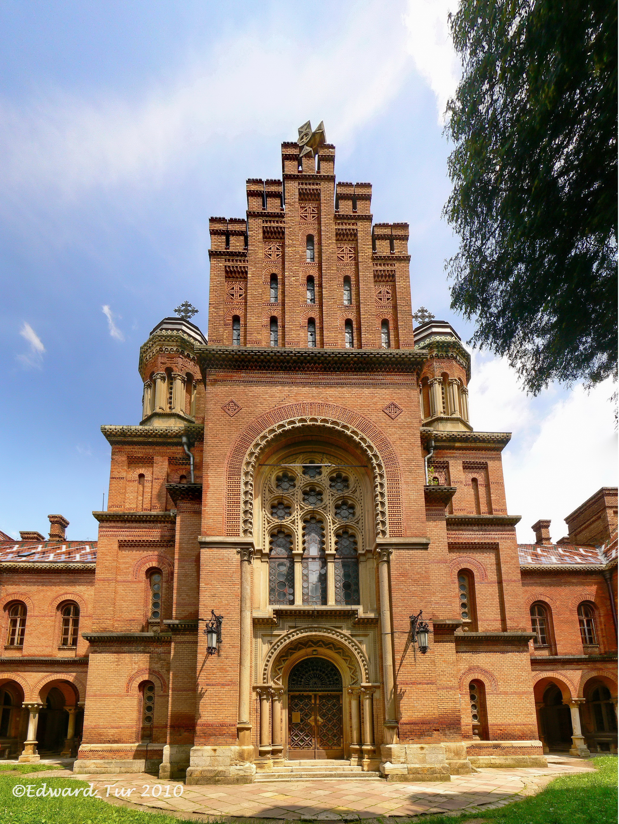 Резиденція Буковинських митрополитів, церква Трьох Святителів